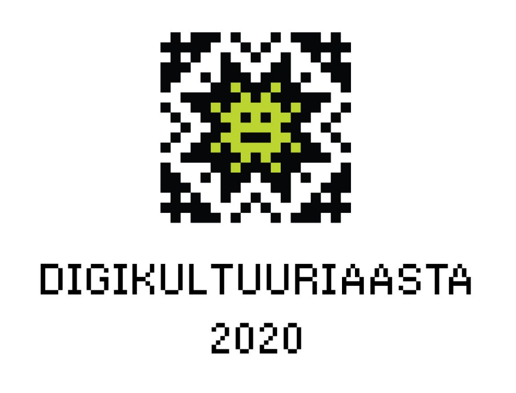 Digikultuuriaasta 2020 logo